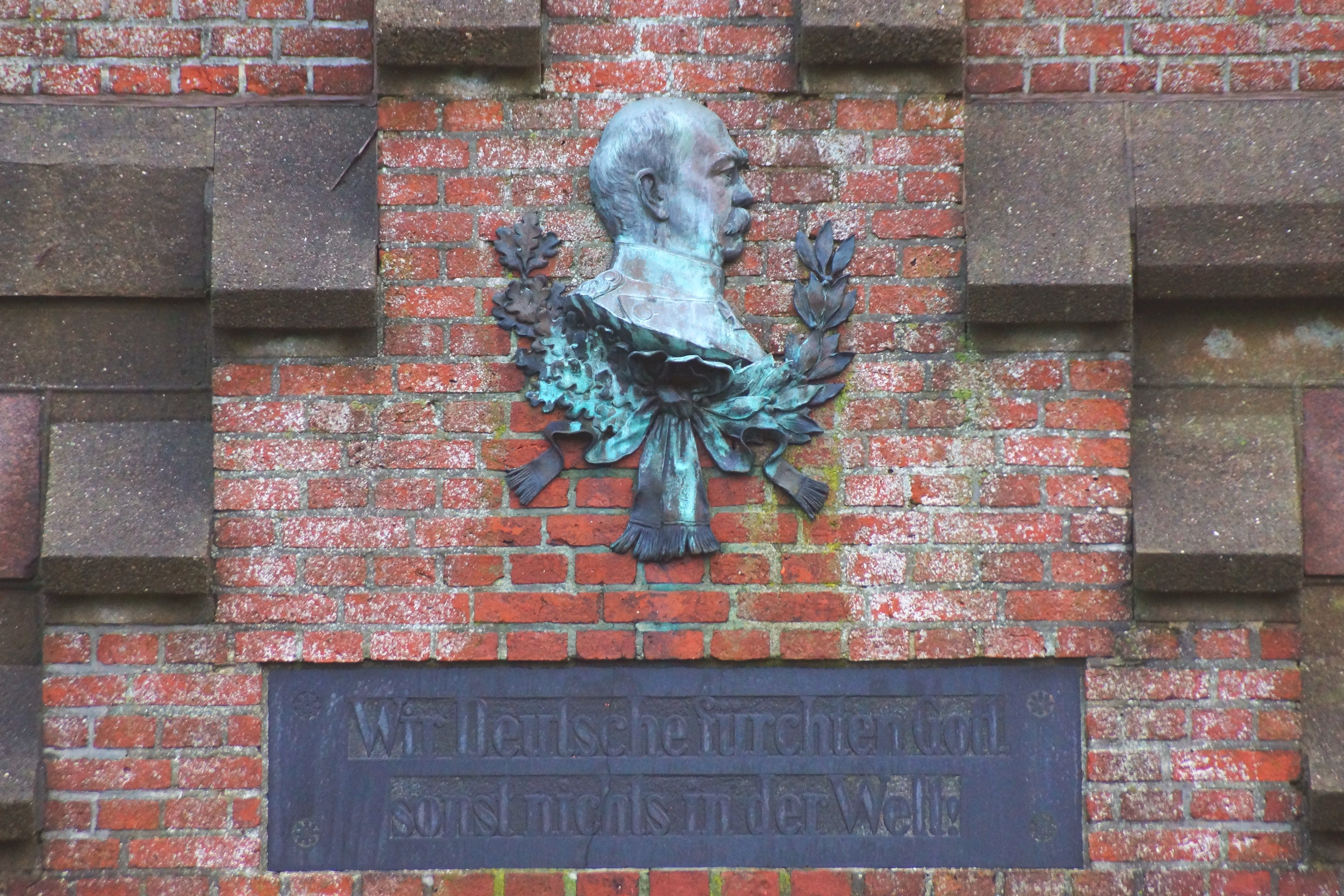 Halbbüste als Bronzerelief von Reichskanzler Otto von Bismarck am Bismarckturm Steinbergkirche-Scheersberg, früher Groß-Quern Ortsteil Scheersberg. Foto Wolfgang Pehlemann DSC00574